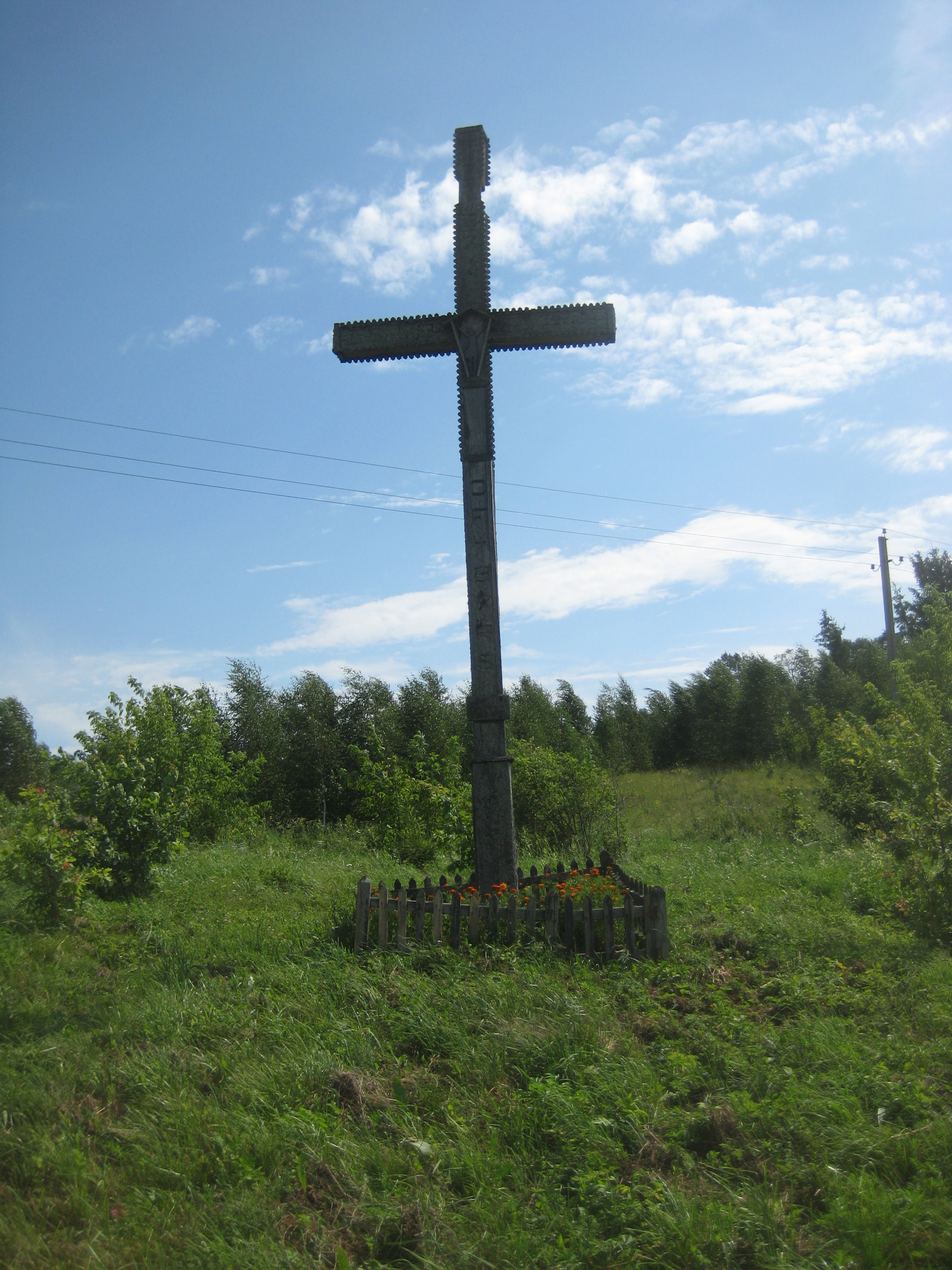 Bileišiai 32300, Lithuania